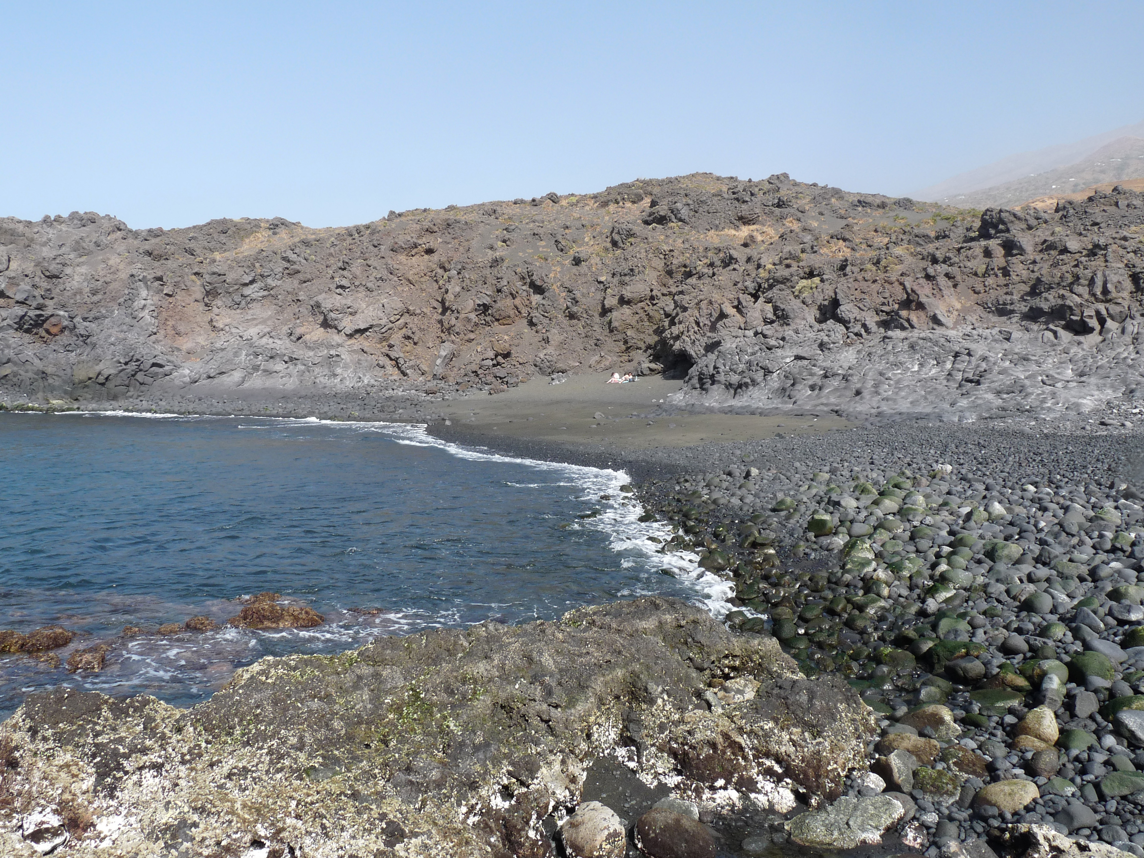 Ponta das Salinas (au nord-ouest de l'île de Fogo, Cap-Vert) : petit port et plage